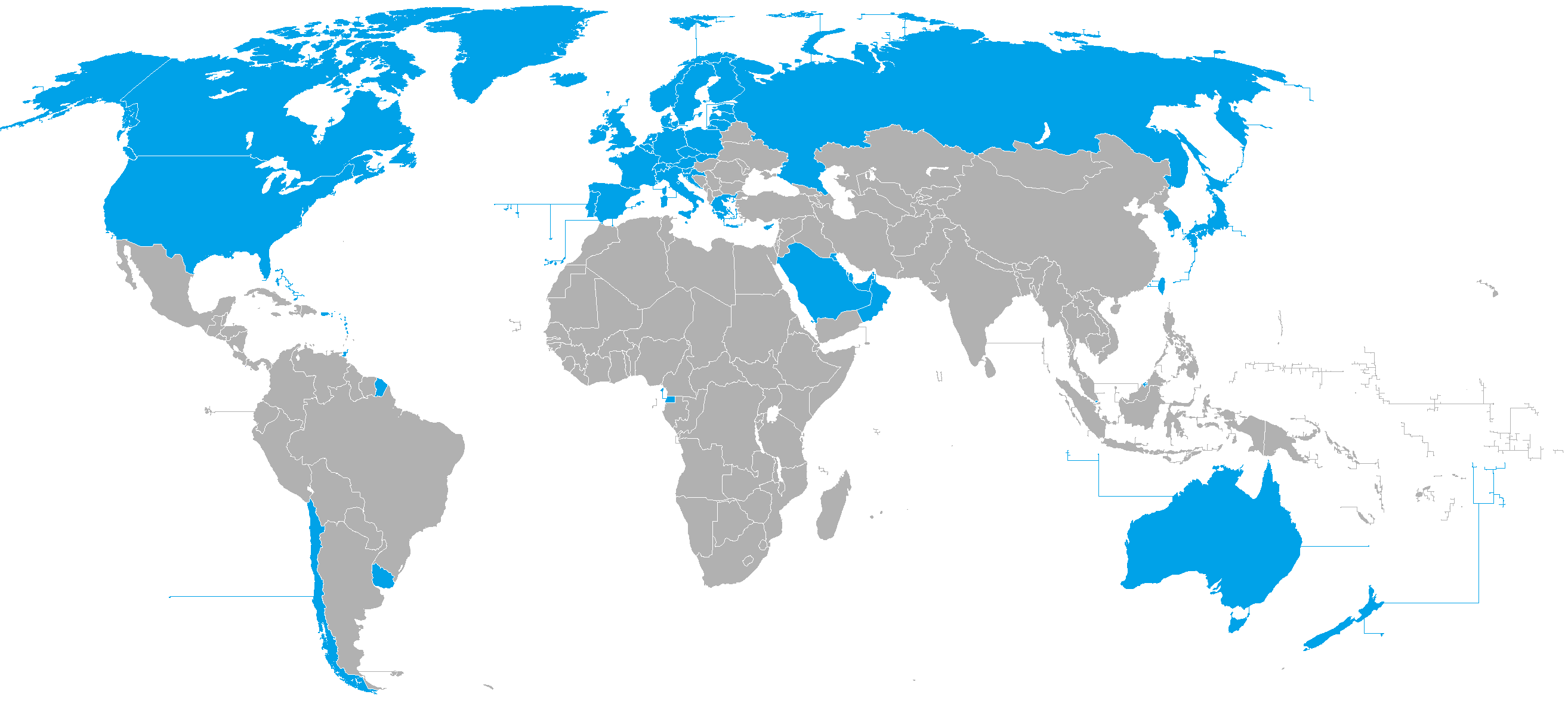 Ingresos altos 2014